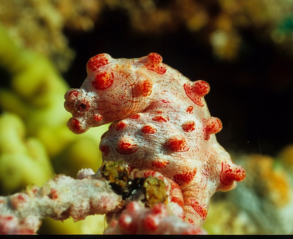 Hippocampus bargibanti Indonesia, Bali, Menjangan Island National Park